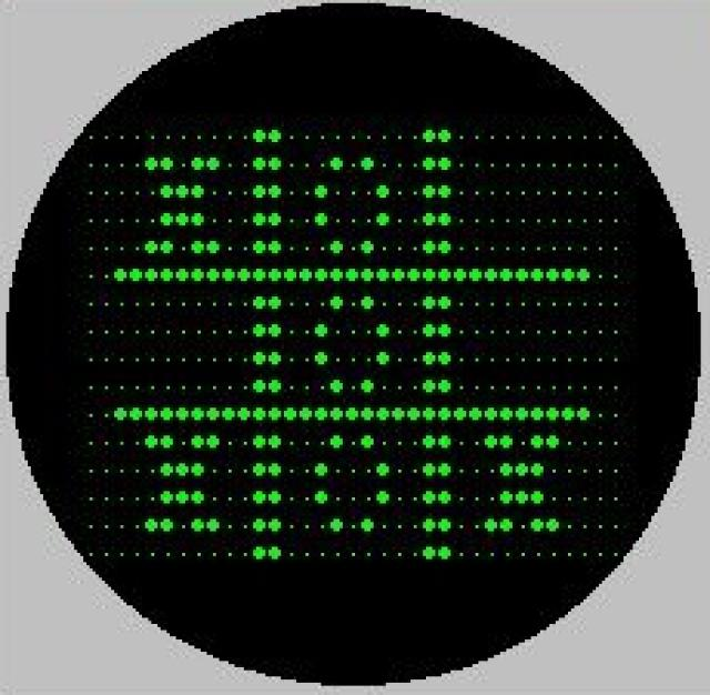 Owalny symulowany zrzut ekranu z gry OXO